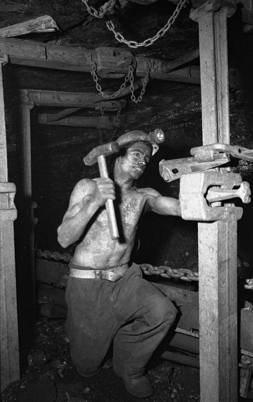 Italienische Gastarbeiter (Bergleute) in Walsum